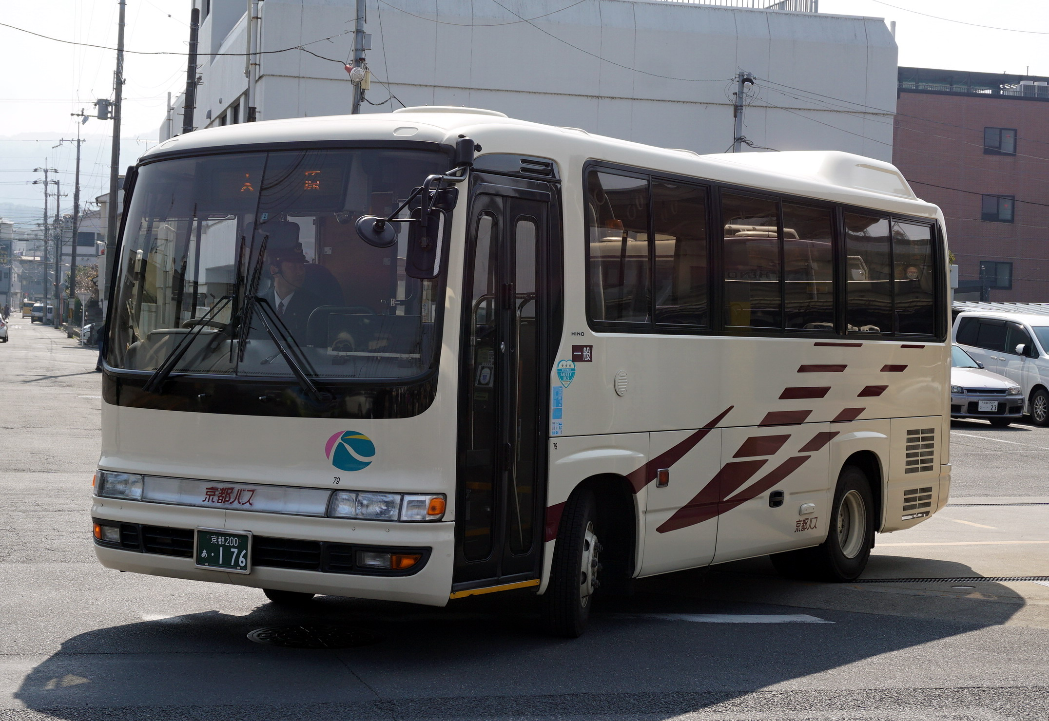 春分の日に1年に1回だけ運行される高野車庫→大原の庫系統